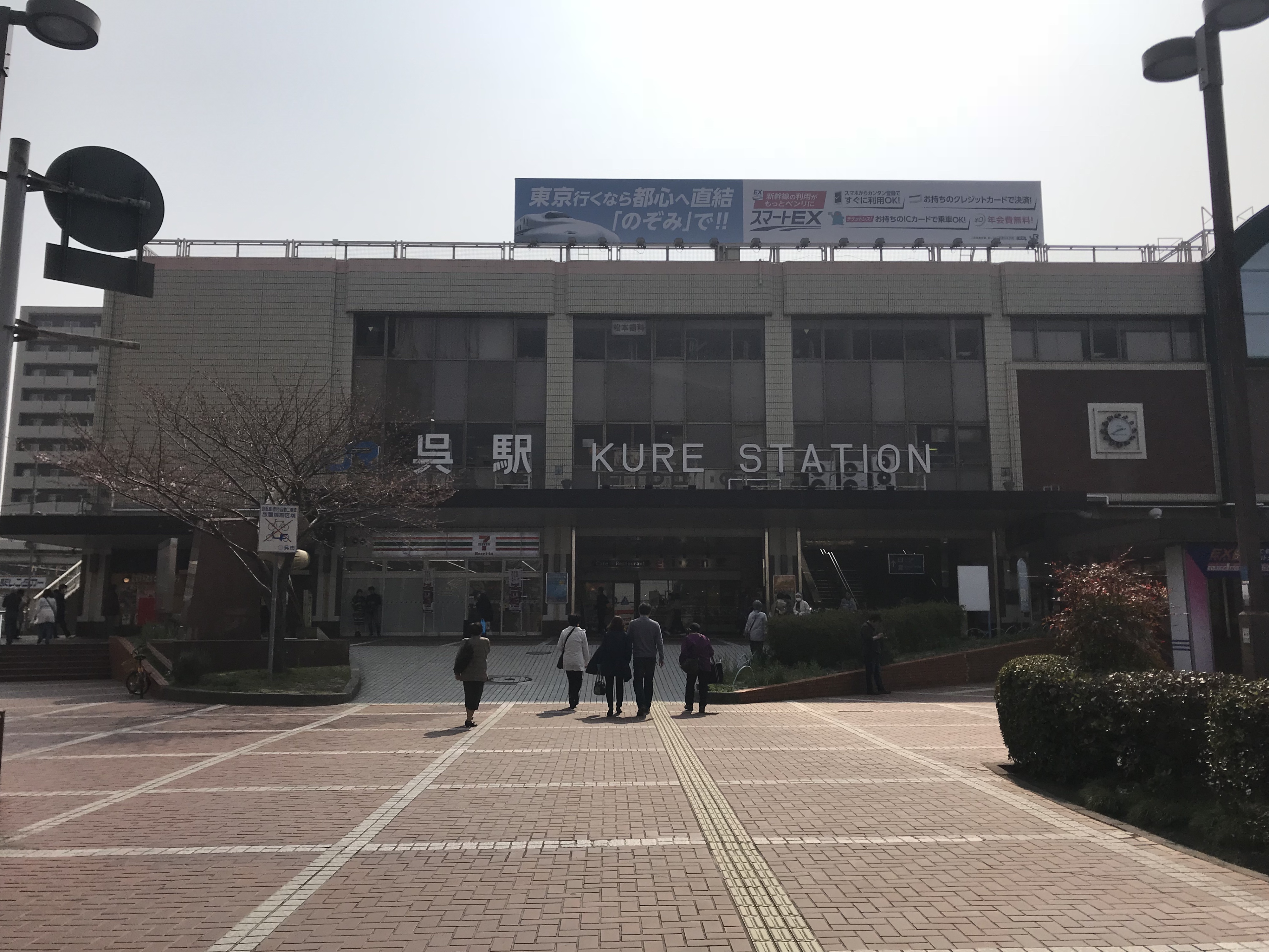 呉駅の駅舎